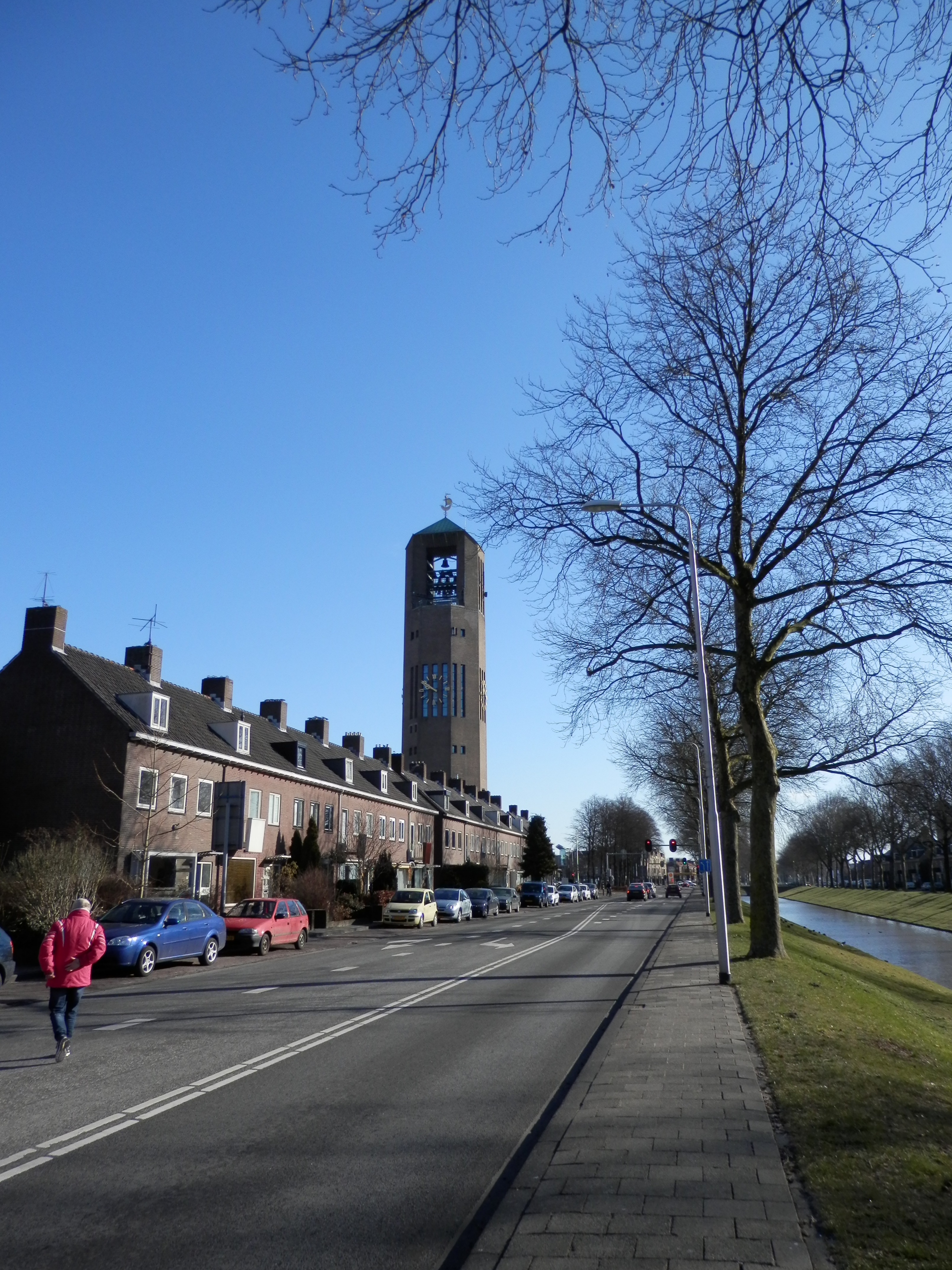 Emmeloord - Poldertoren 2013 - Gezien vanaf de Korte Dreef